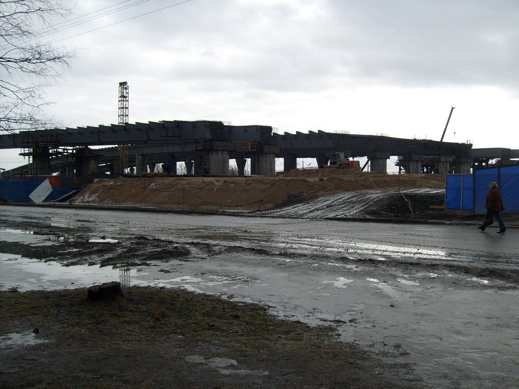 Строительство развязки кольцевой автодороги на Дачный проспект, Санкт-Петербург